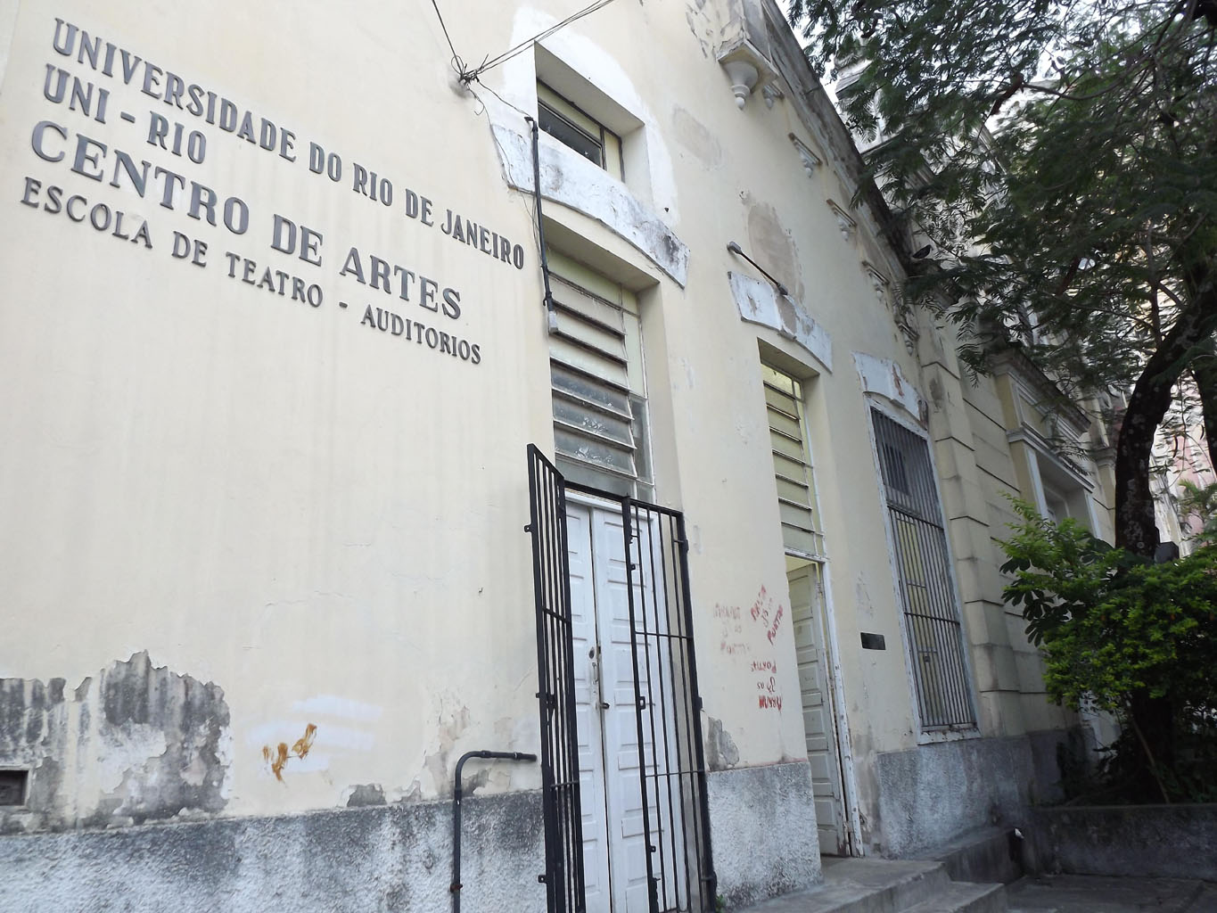 Centro de Letras e Artes - Auditórios